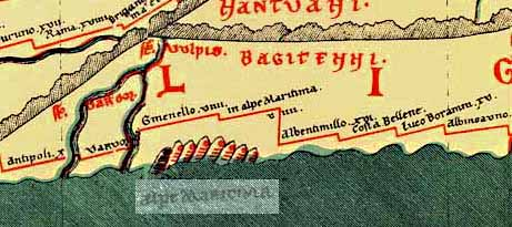 La table de Peutinger avec localisation des Alpes maritimes et du quartier de Cemenelum (Cimiez).